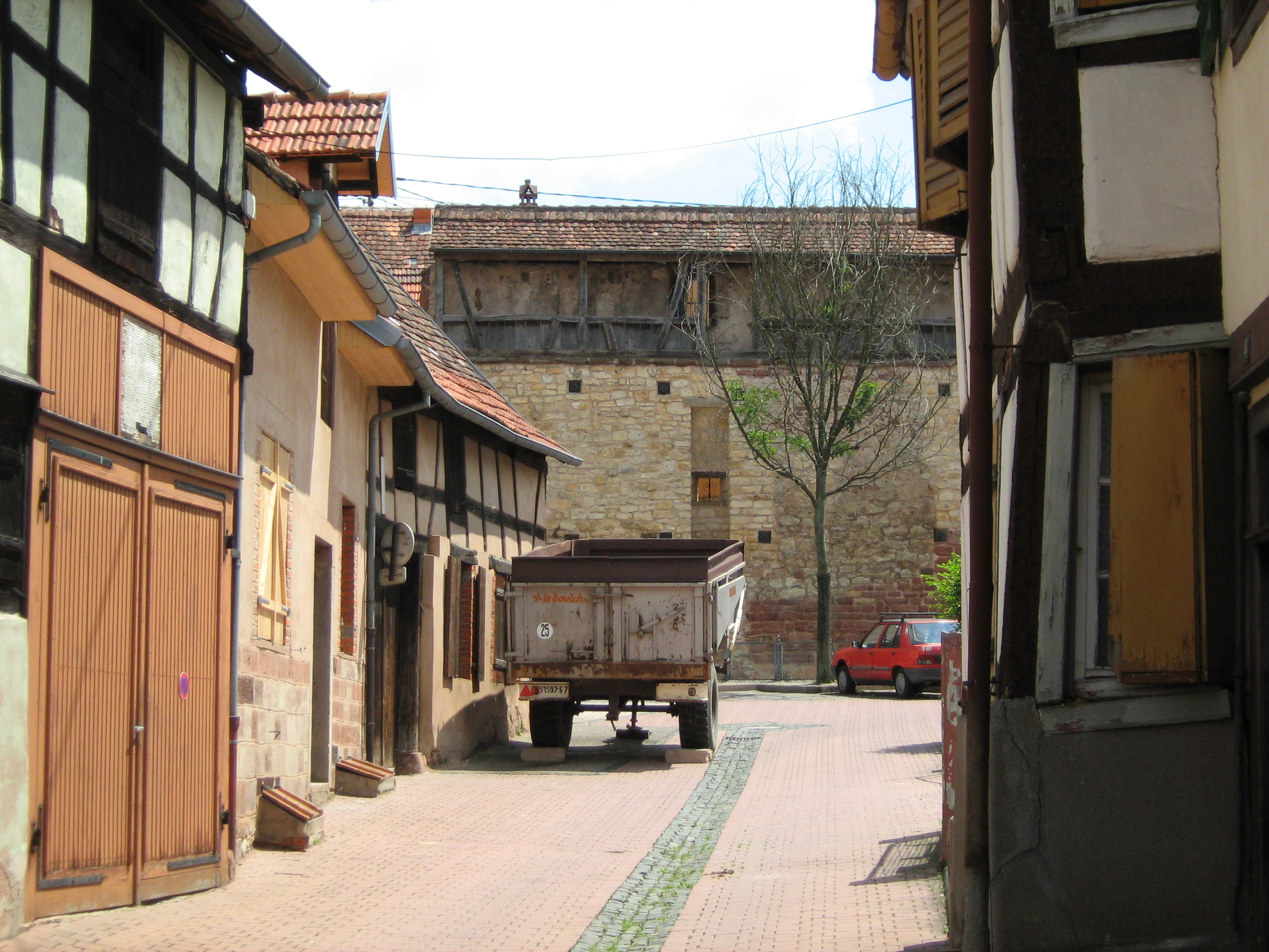 rempart de Bouxwiller (67) France